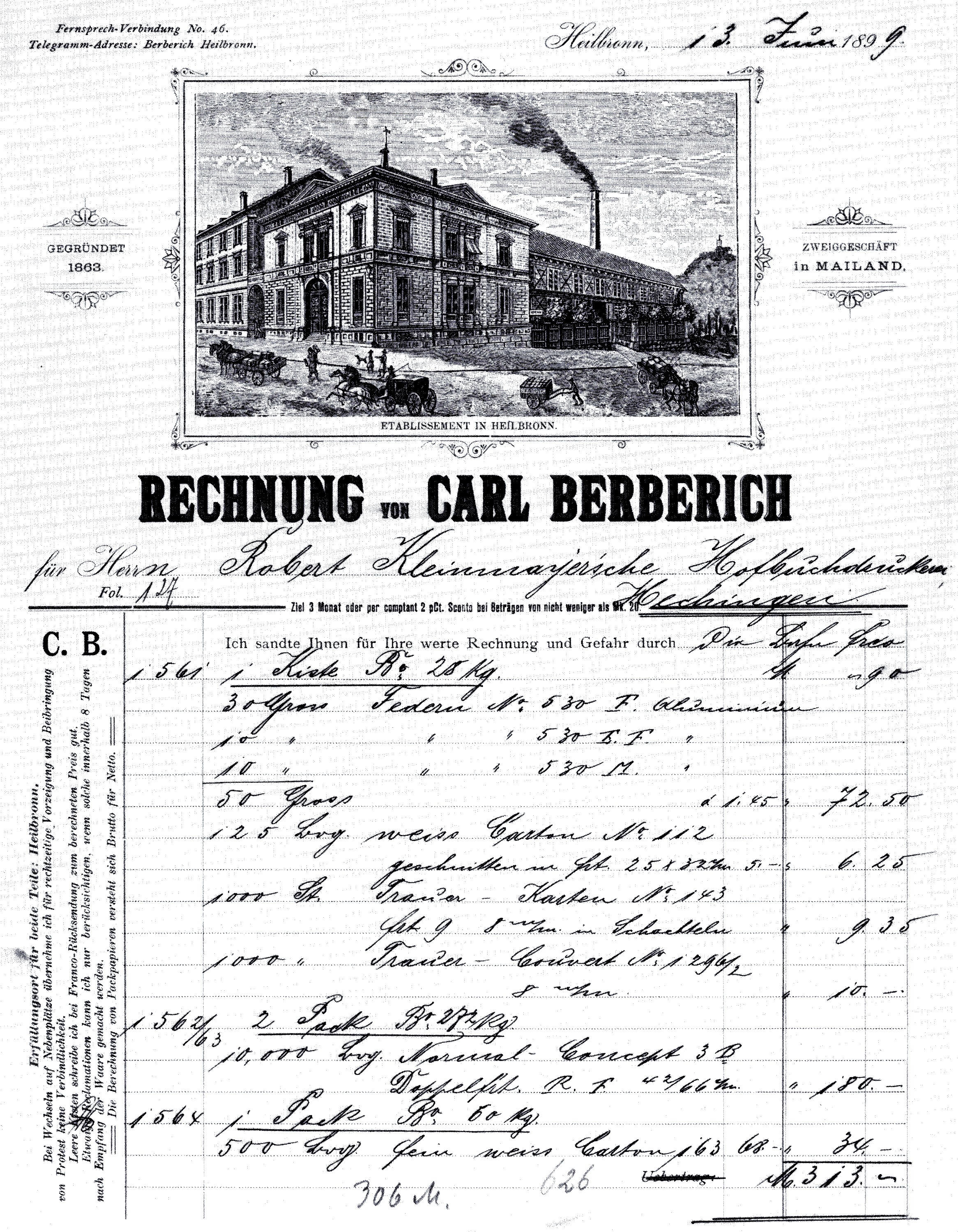 Rechnung des Heilbronner Papiergroßhändlers Berberich mit Lithographie des Unternehmensgebäudes im Kopf